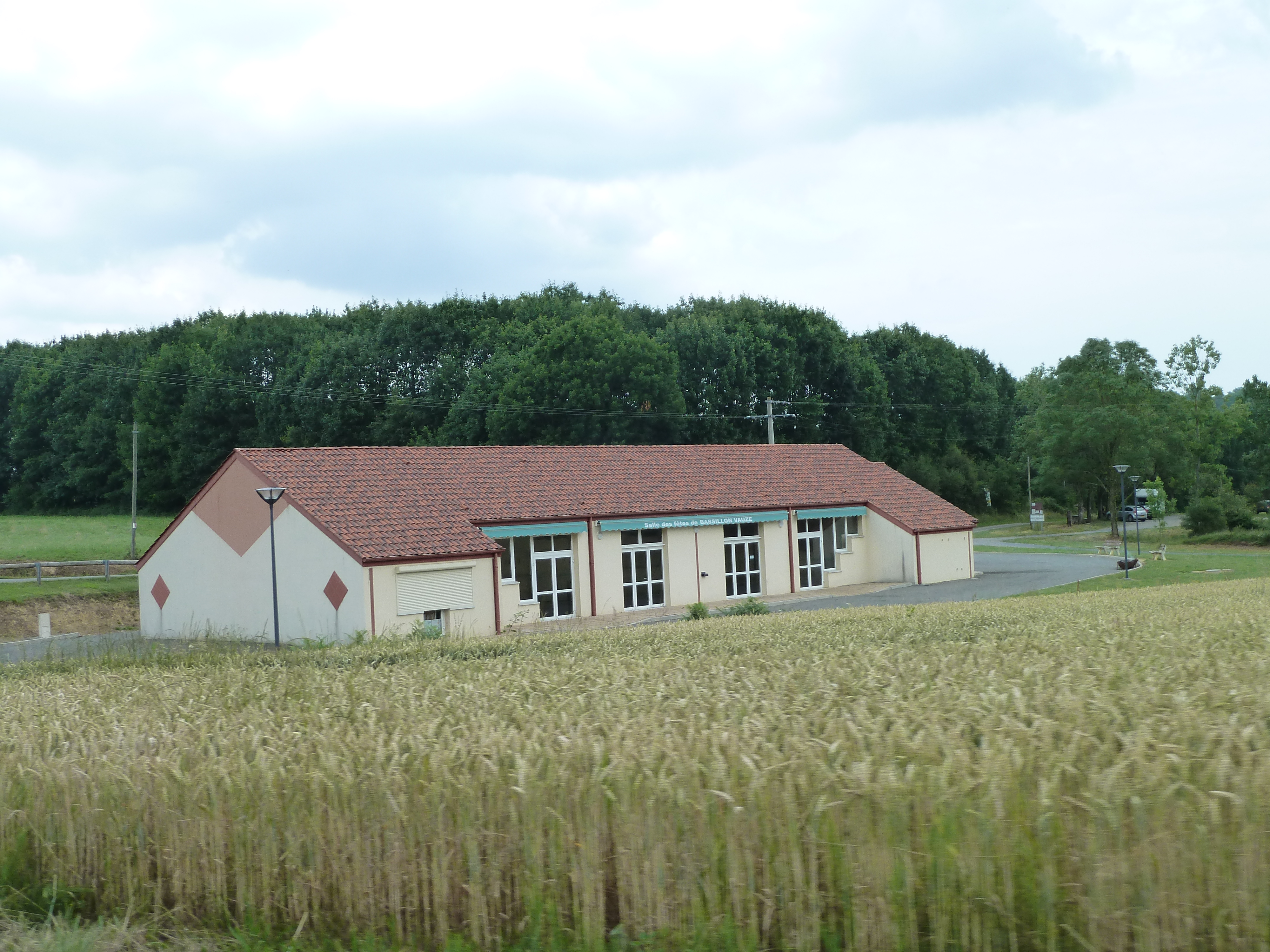 Salle polyvalente de Bassillon-Vauzé